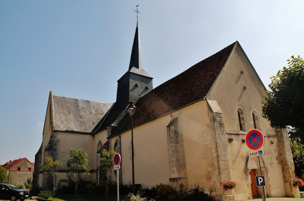 église St Pierre